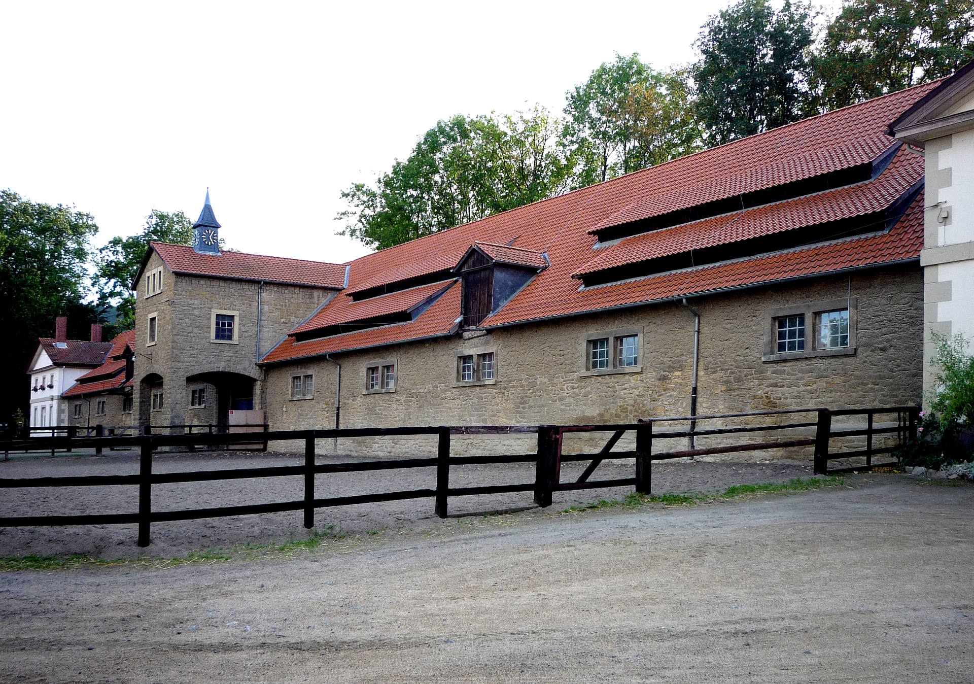 Teilansicht Vollblutgestüt Bündheim-Bad Harzburg. Aufnahmedatum 2009-09.